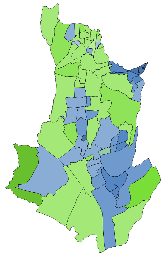 中文（台灣）: 顏色對照表